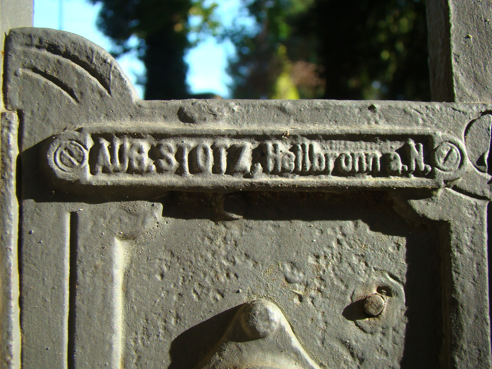 Bismarckstraße 48 (Heilbronn)